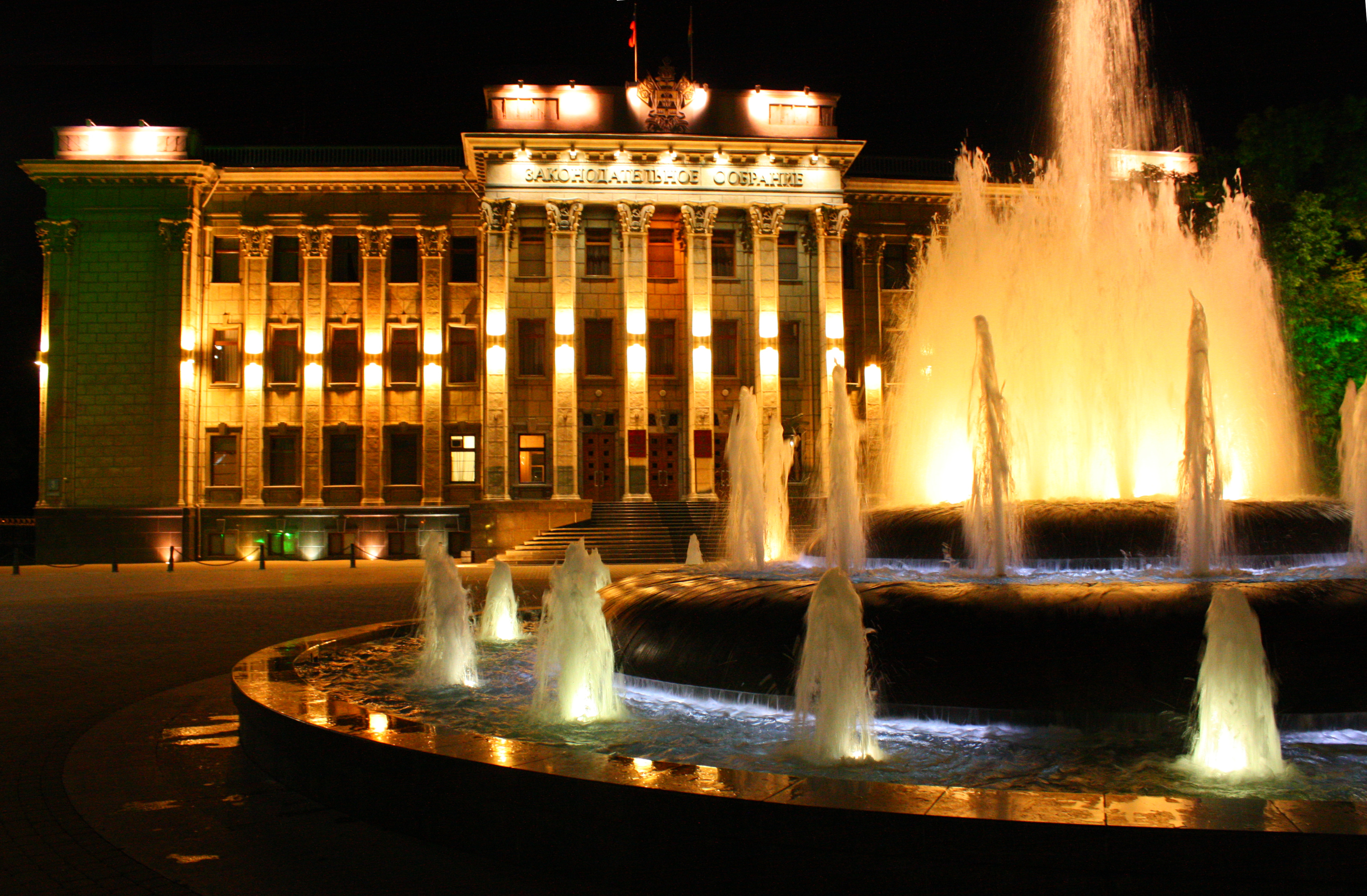 Законодательное собрание Краснодарского края, ул. Красная, д.3